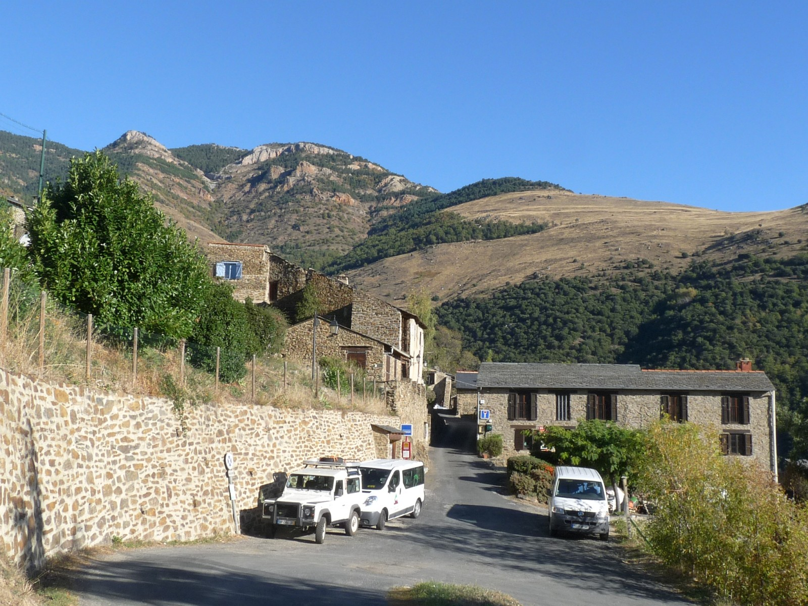 Entrée de Jujols (mairie à droite), Pyrénées-Orientales, France